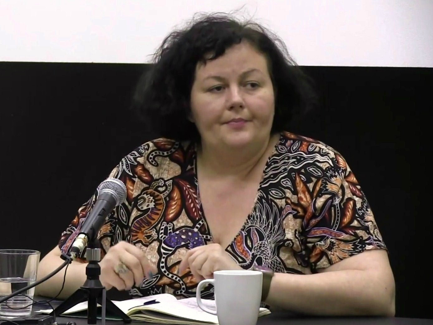 Ewa Majewska, filozofka i feministka.